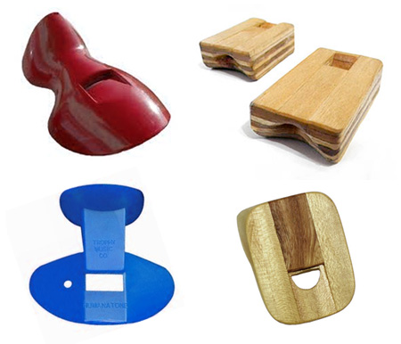 各種鼻笛設計